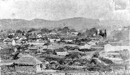 Panorámica de Cúcuta - 1800